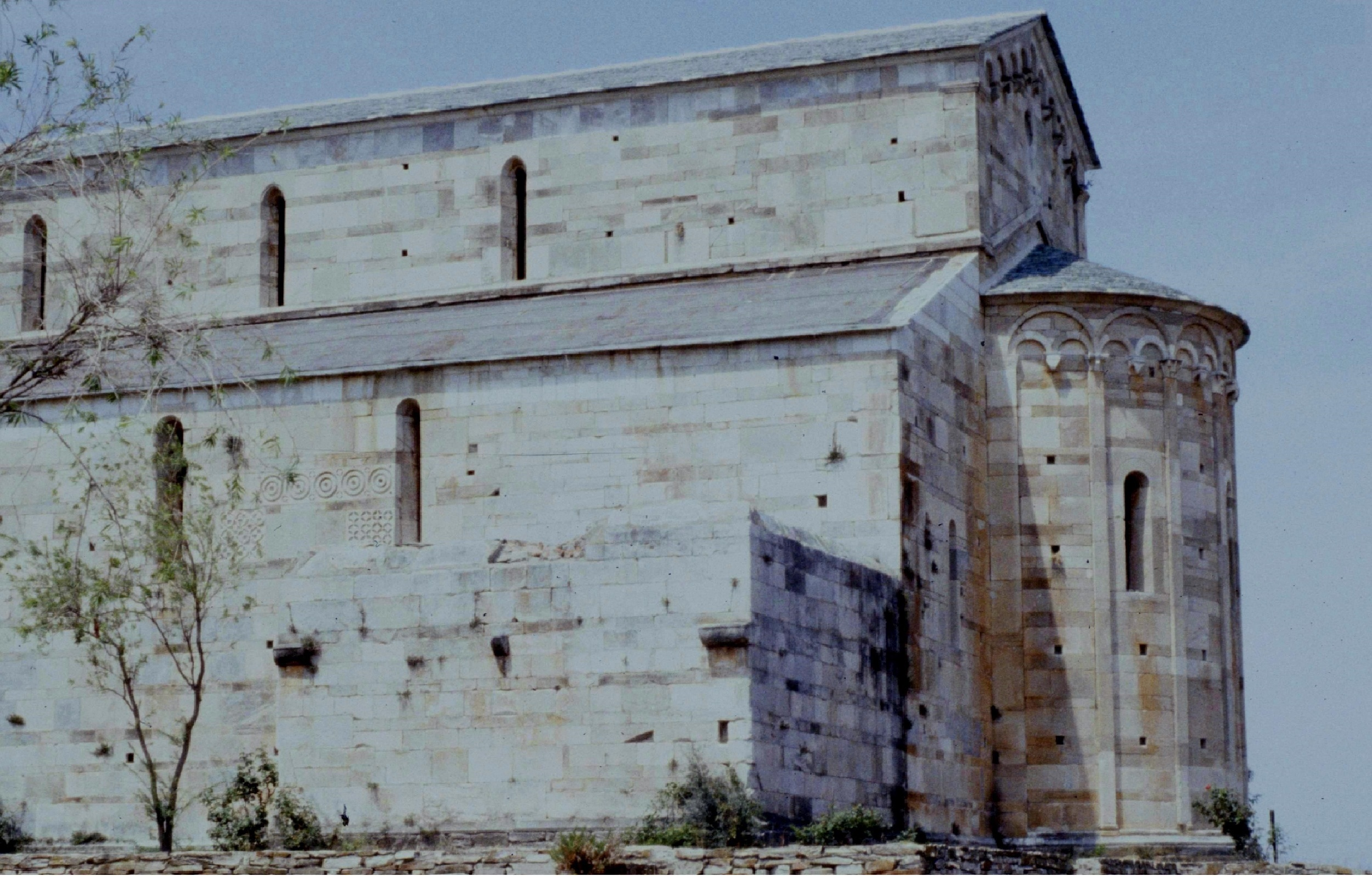 Haute-Corse La Canonica Cathédrale Sainte-Marie-De-L'Assomption De Lucciana 071989